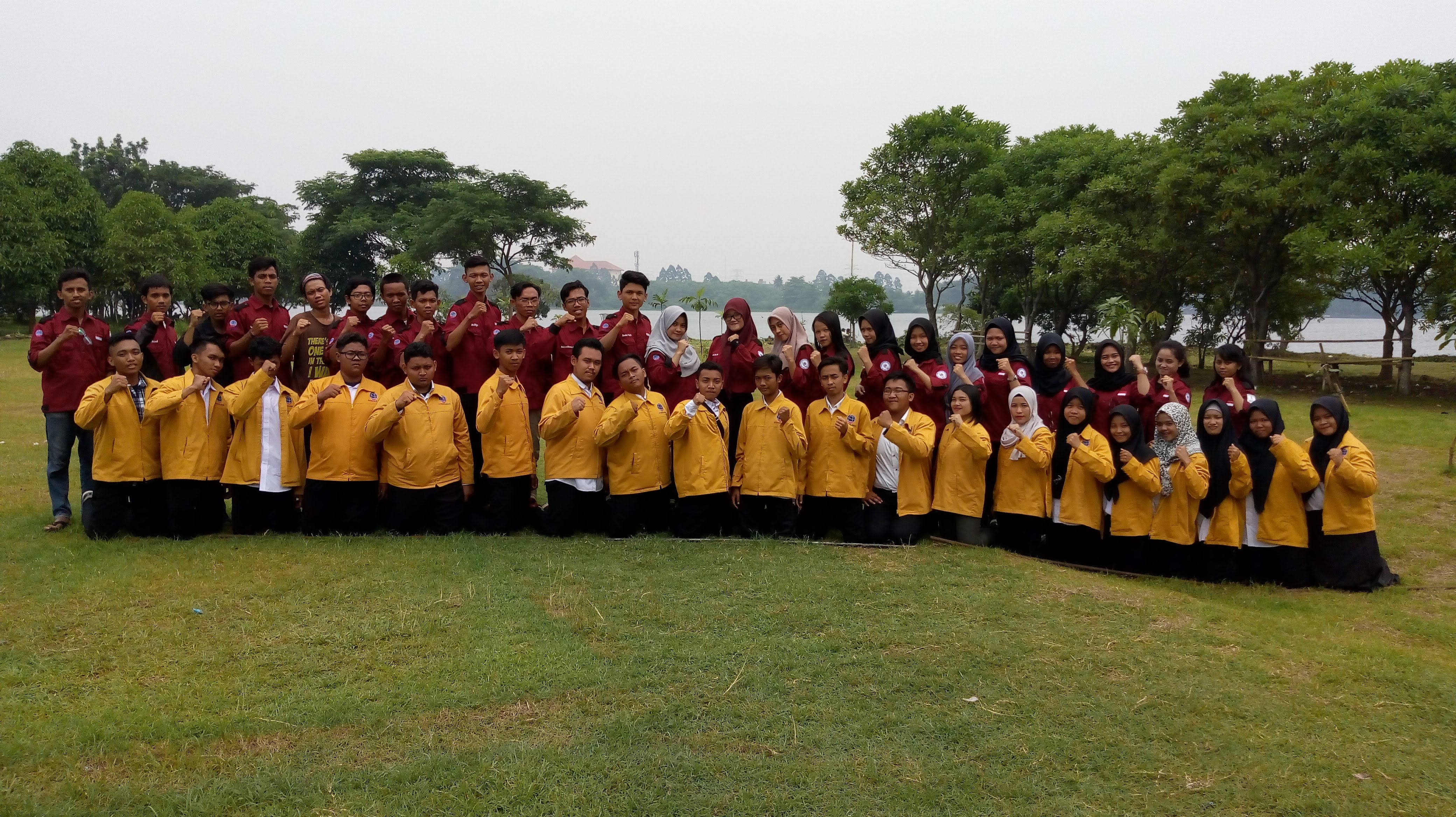 LDKM BEM dan UKM STMIK Bina Sarana Global